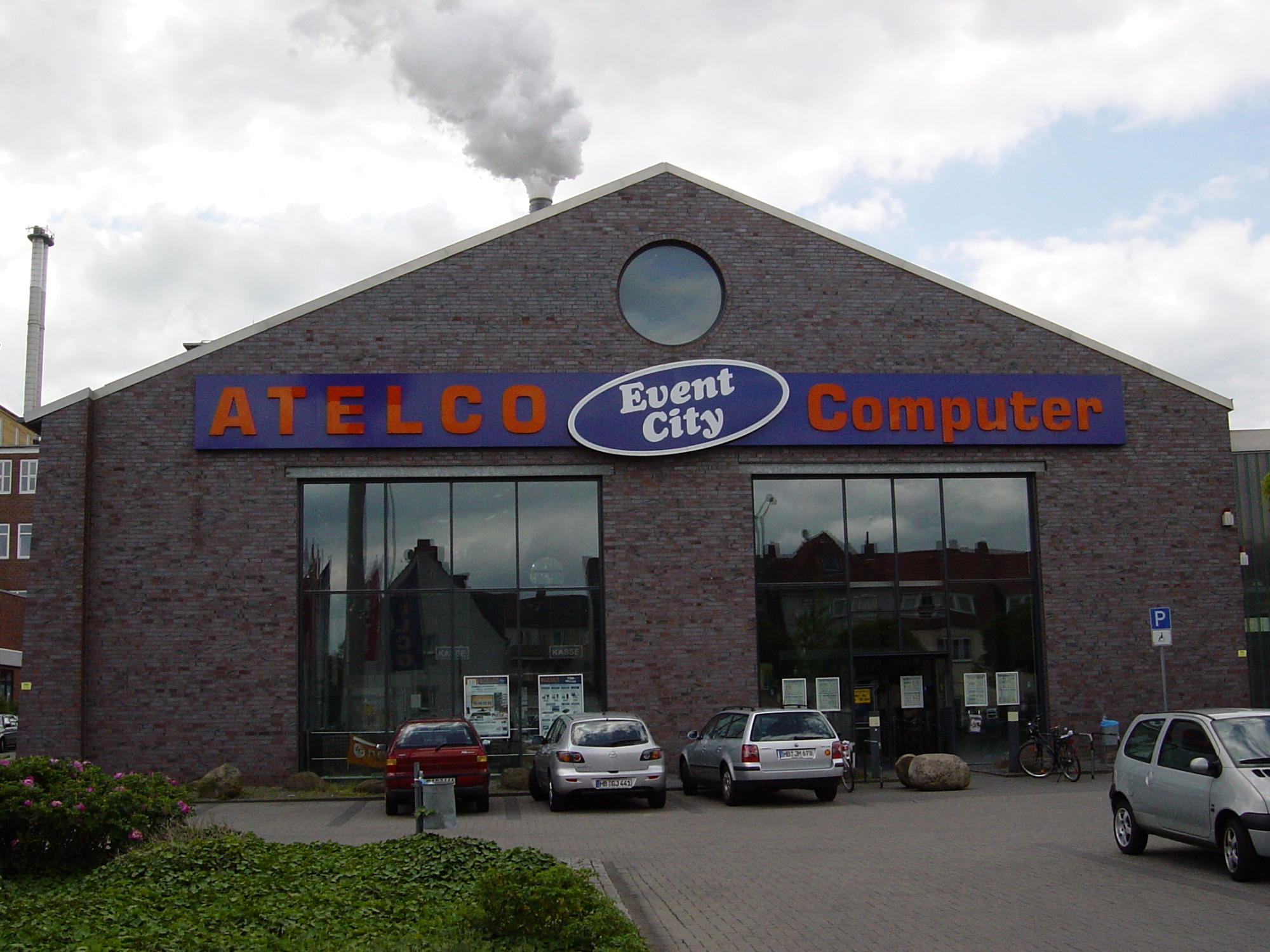 Atelco Computer Event-City, Föhrenstraße 81 (Ecke Pfalzburger Str.), 28207 Bremen